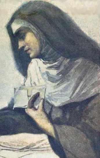 Representa a Soror Mariana Alcoforado. Pertence à capa de Cartas de amor ao cavaleiro de Chamilly.